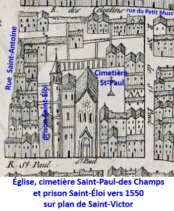 Église, cimetière St-Paul et prison St-Eloi vers 1550 sur plan de St-Victor